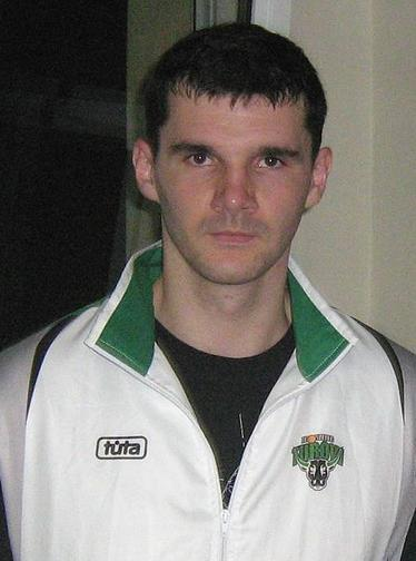 Robert Witka - koszykarz, zawodnik PGE Turowa Zgorzelec